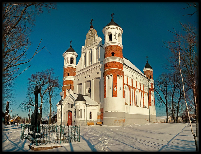 Сьвята-Раства-Багародзіцкая царква(крэпасьць абарончага тыпу)